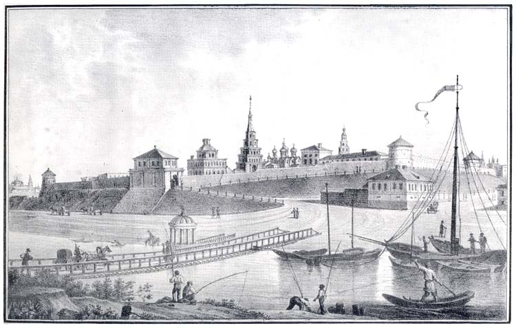 Вид Казанской крепости. Из альбома: Перспективные виды губернского города Казани, рисованы с натуры, литографированы и изданы Василием Туриным. — Москва, 1834.